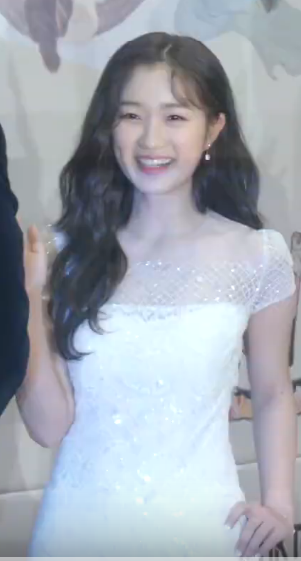 30일 오후 서울시 마포구 상암동 MBC 미디어센터에서 ‘2019 MBC 연기대상’ 시상식이 열려 식전 행사로 MBC 수목드라마 ‘어쩌다 발견한 하루’ 김혜윤, 로운, 이재욱, 이나은, 이태리, 정건주 가 참석해 포토타임을 갖고 있다.